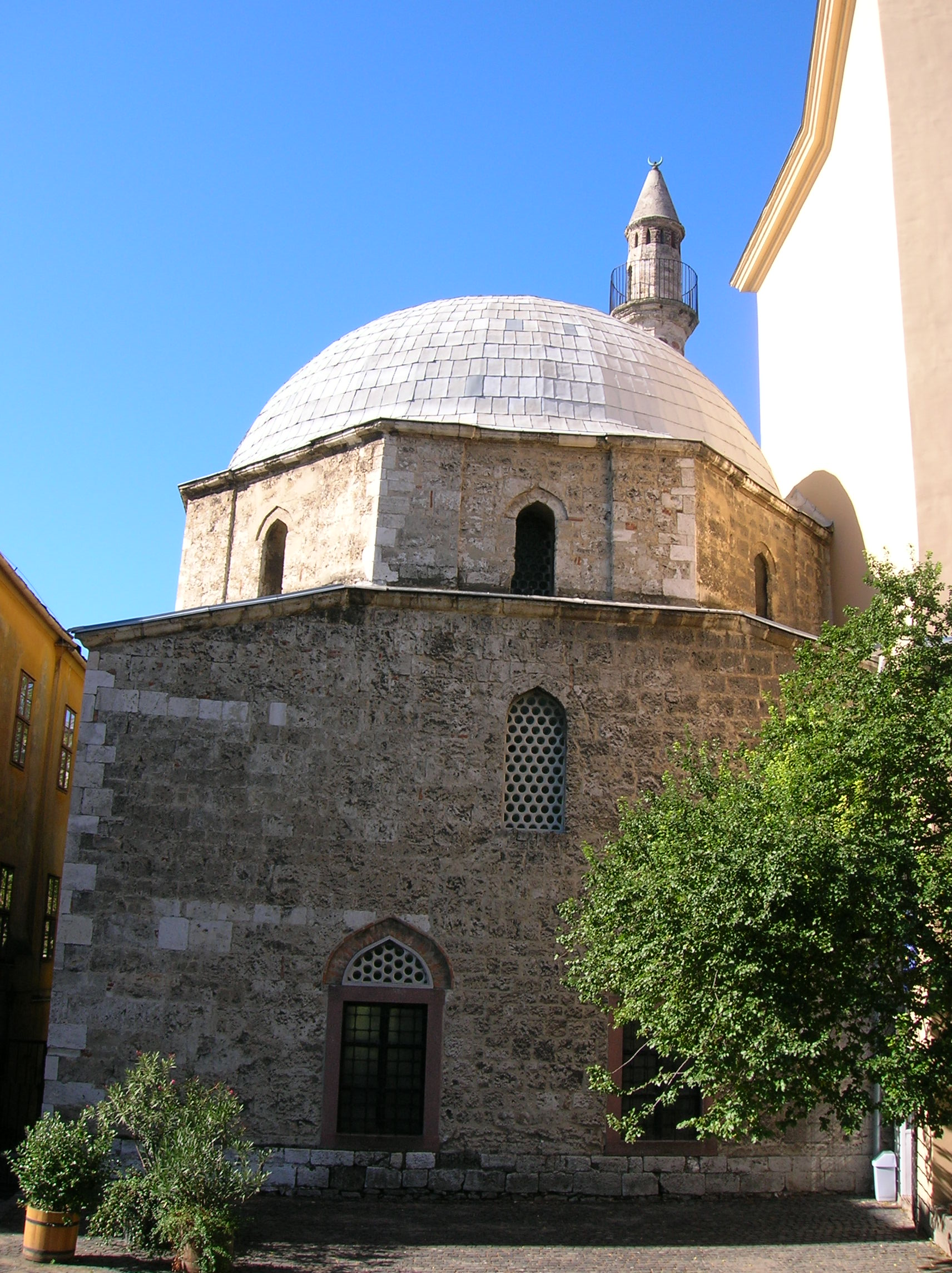 Pasha Yakovali Hassan's mosque, Pécs, Hungary